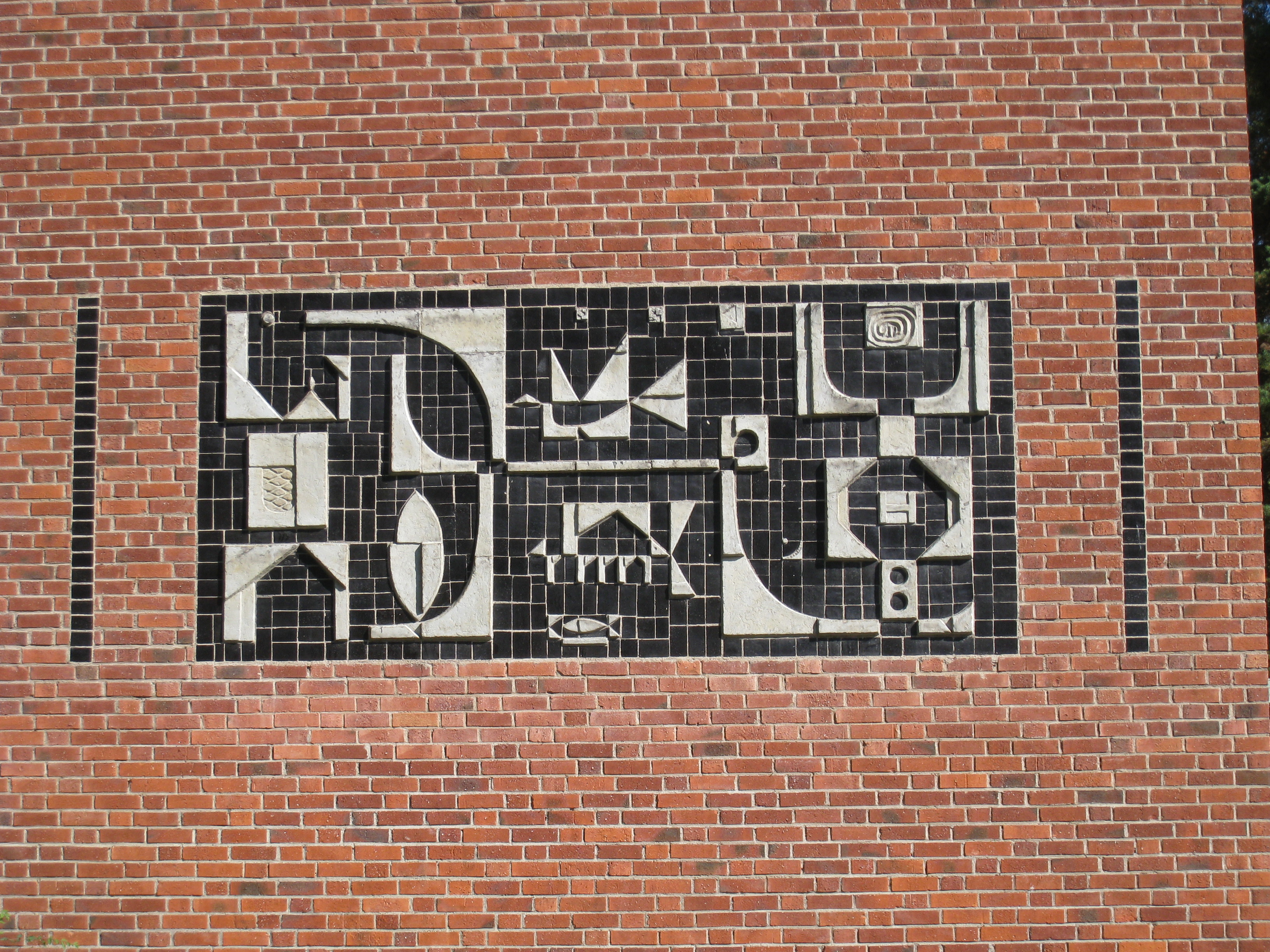 Blackebergs gymnasium, Wergelandsgatan 22, Blackeberg, Bromma, Stockholm. Mosaik av Elis Eriksson. Stengodsreliefen "Symbolik" (1954) är en stilisering av undervisningsämnena.